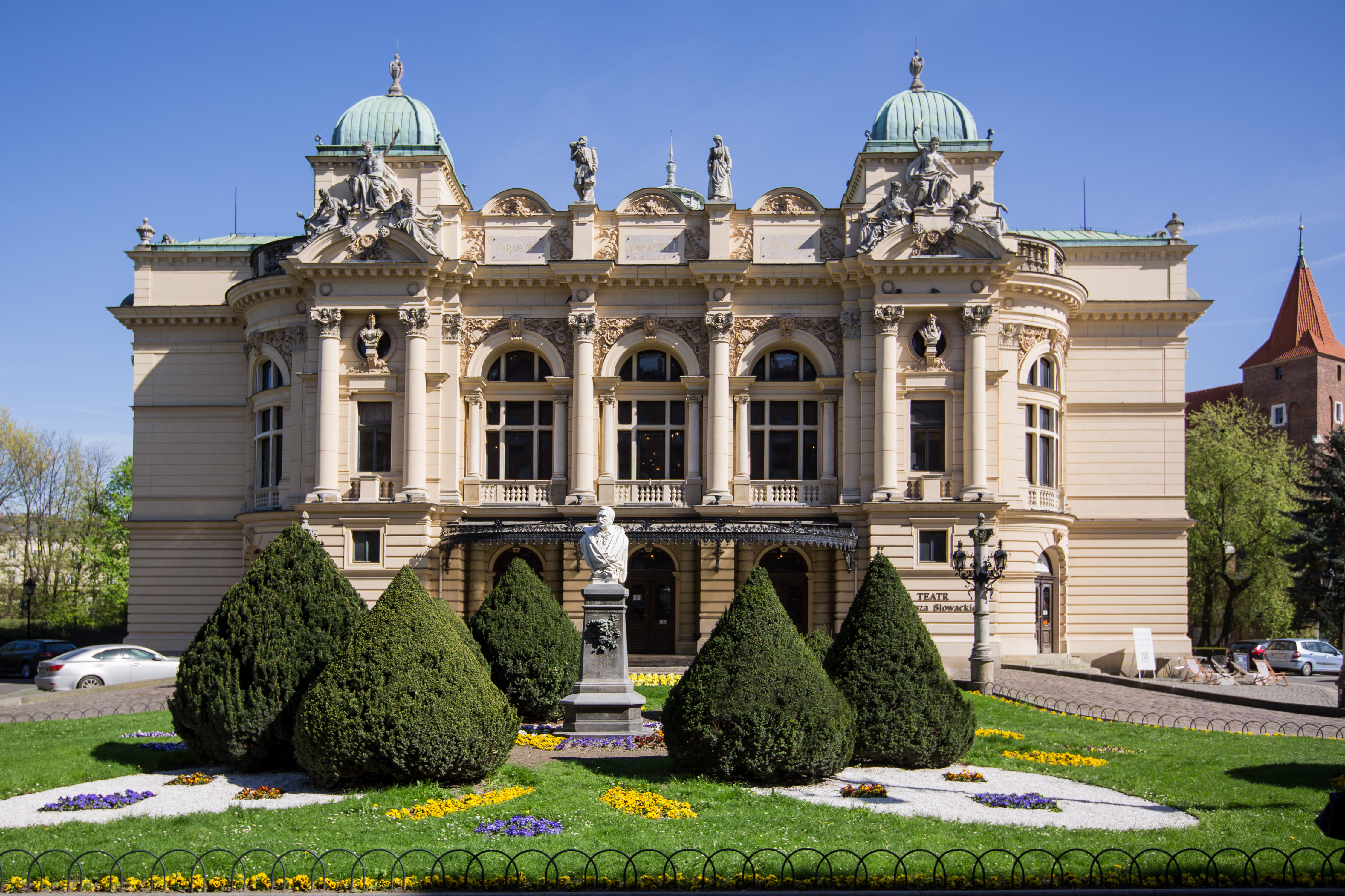 Teatr im. Juliusza Słowackiego w Krakowie